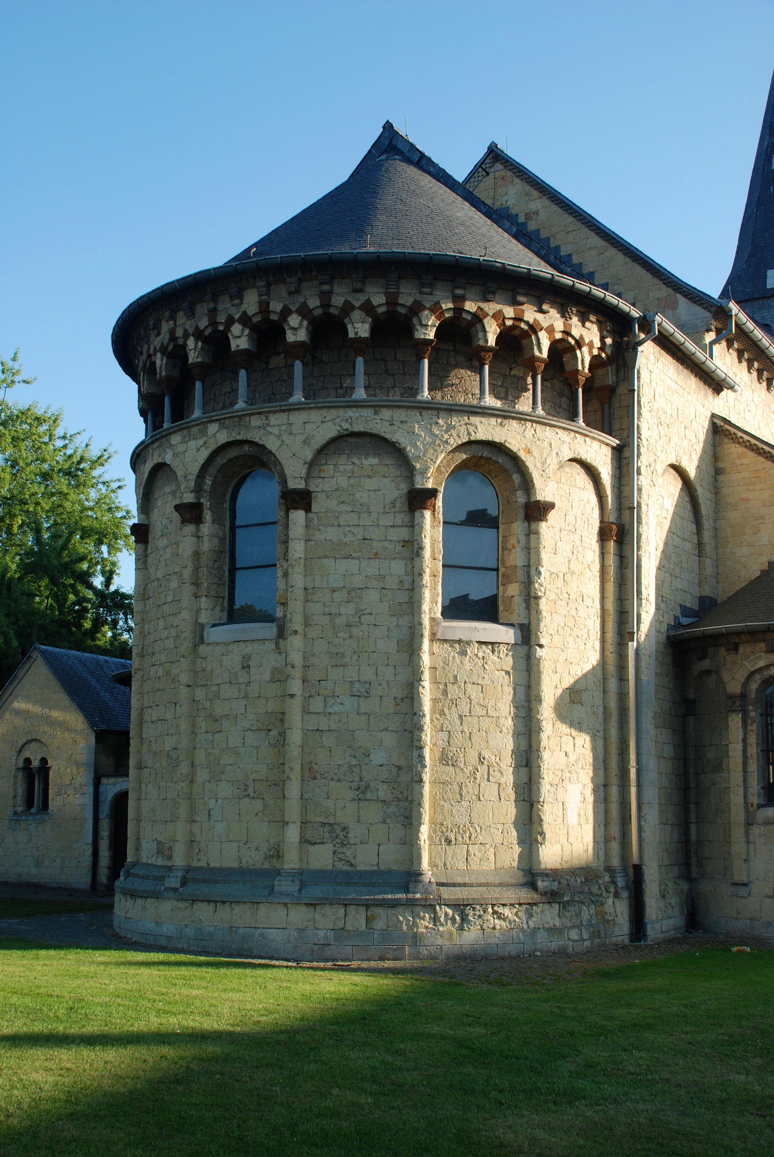 Belgique - Province de Limbourg - Église Saint-Pierre de Saint-Trond